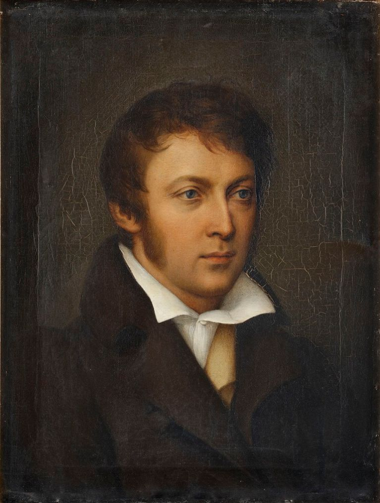 Unknown painter: Portrait Ferdinand Ruscheweyh, Staatliches Museun Schwerin